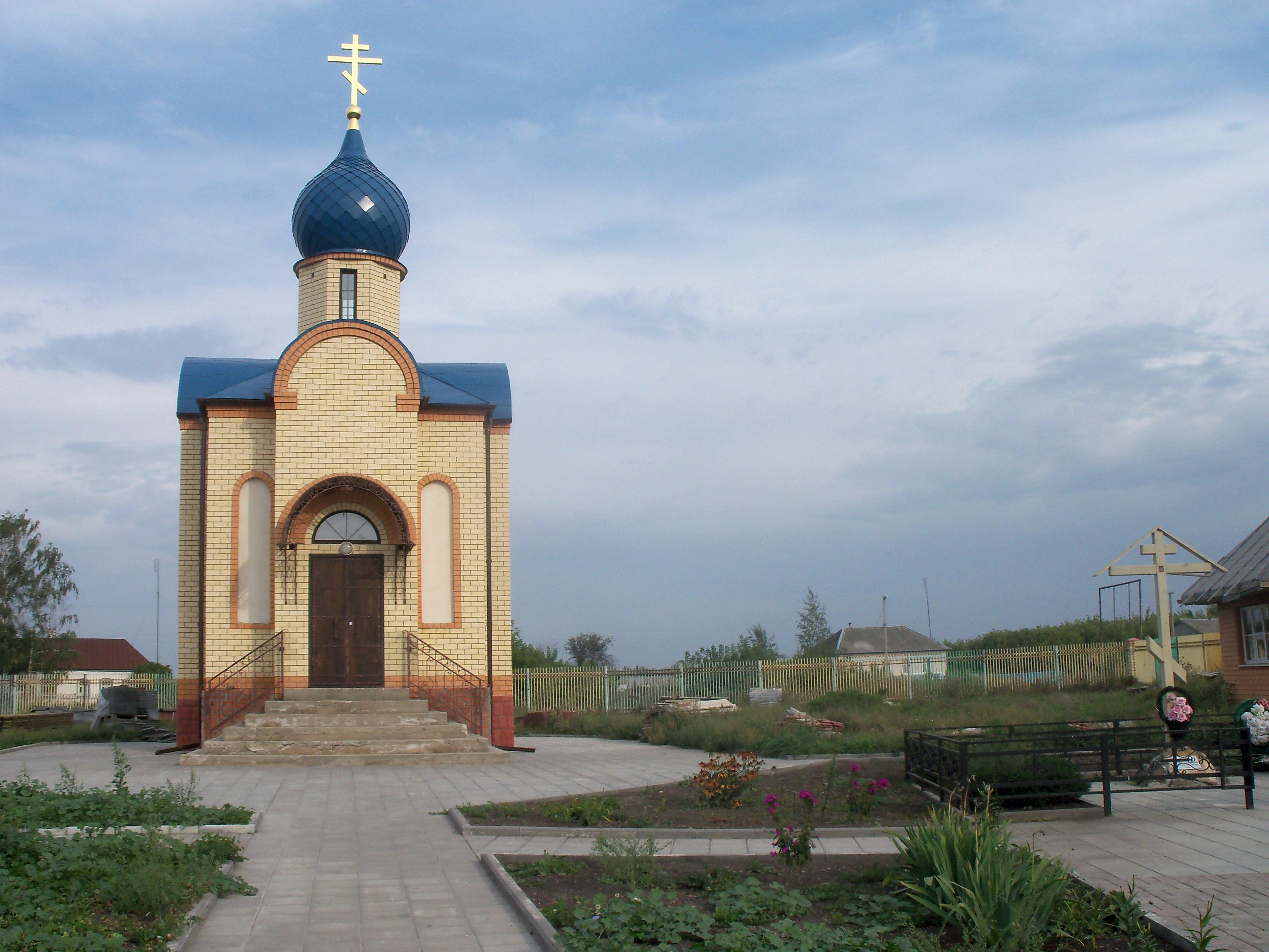 Покровская церковь в селе Борисовка.